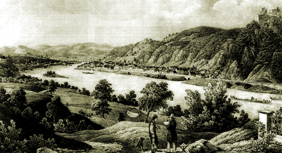 Krško leta 1840